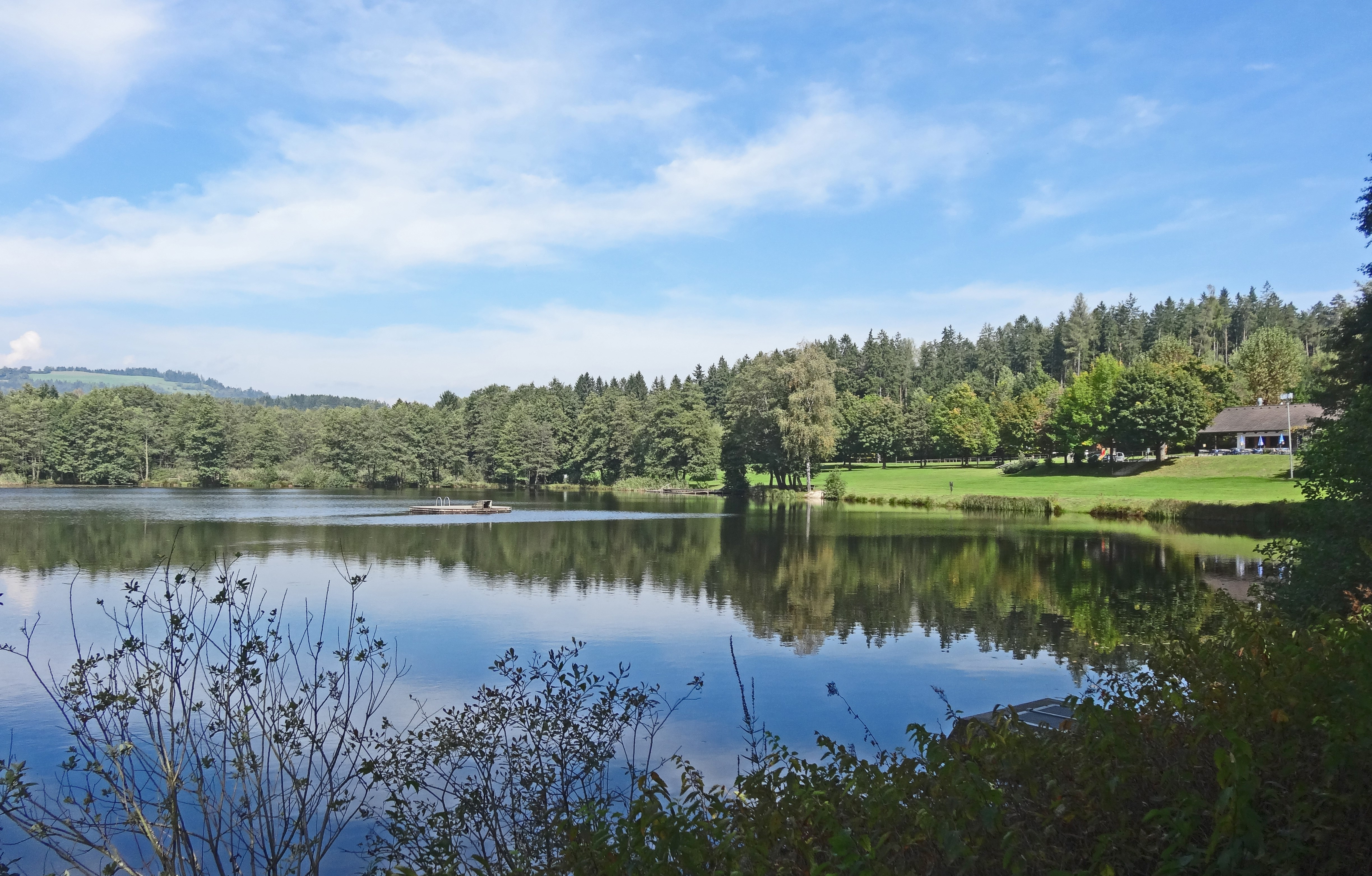 Der Flatschacher See, rechts im Bild Liegewiese und Restaurant